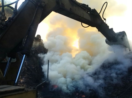 Српски (ћирилица): Гашење пожара проузрокованог самозапаљењем угља